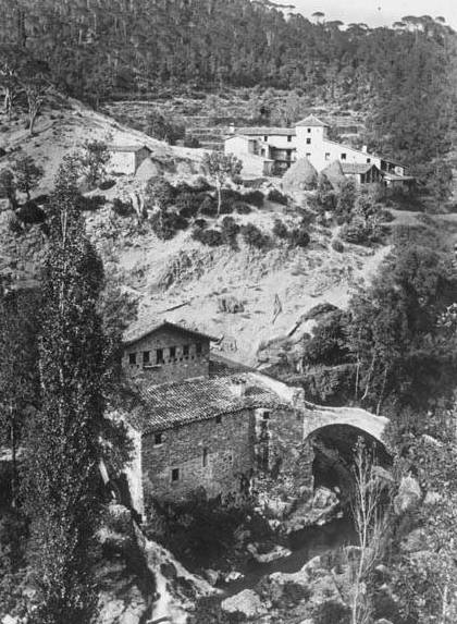 Imatge